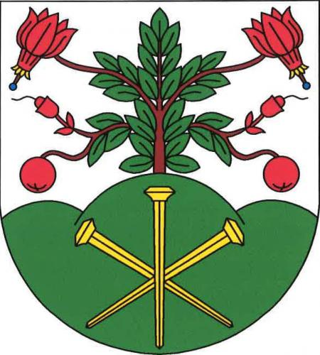 Kalek, znak. Ve stříbrném štítě vyrůstá ze zeleného trojvrší se třemi zlatými zkříženými kovanými hřeby klikva bahenní přirozené barvy.